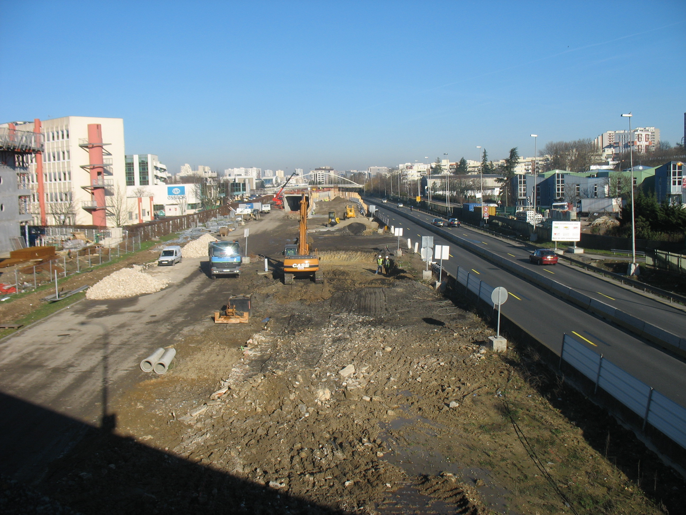 À droite, la voie RD1 en direction de Paris. Au milieu, l'emplacement de la futur RD1 en direction de la province. À gauche, l'ancienne plate-forme de la RD1 qui servira de plate-forme pour le prolongement.